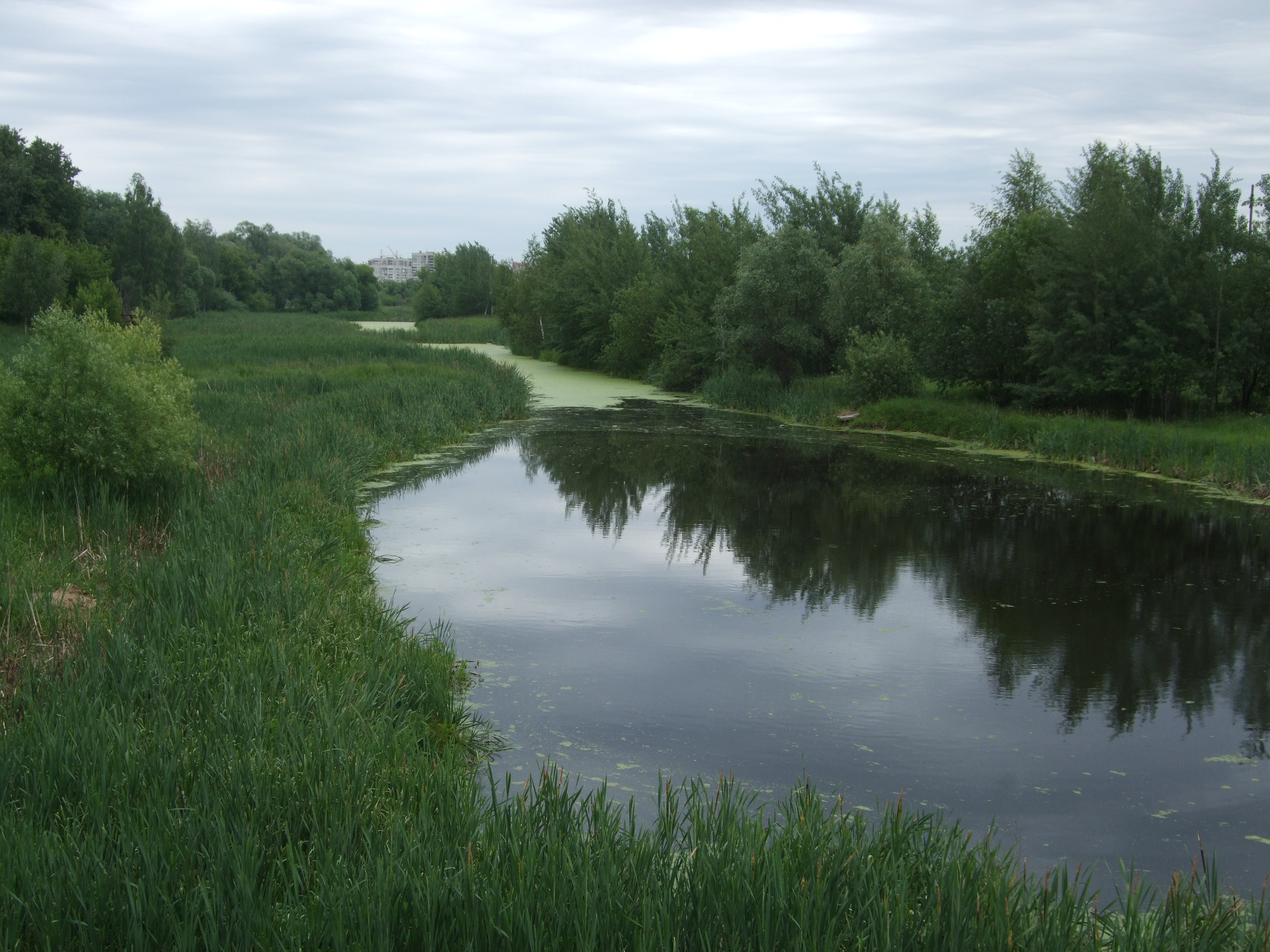 Россия, Московская область, Раменский район. Река Быковка (протока Пехорки), вид с пешеходного моста, связывающего деревню Верея и посёлок Фабрики Спартак, от Вереи ниже по течению в сторону города Жуковский (город виден на дальнем плане: панельные многоэтажные дома).